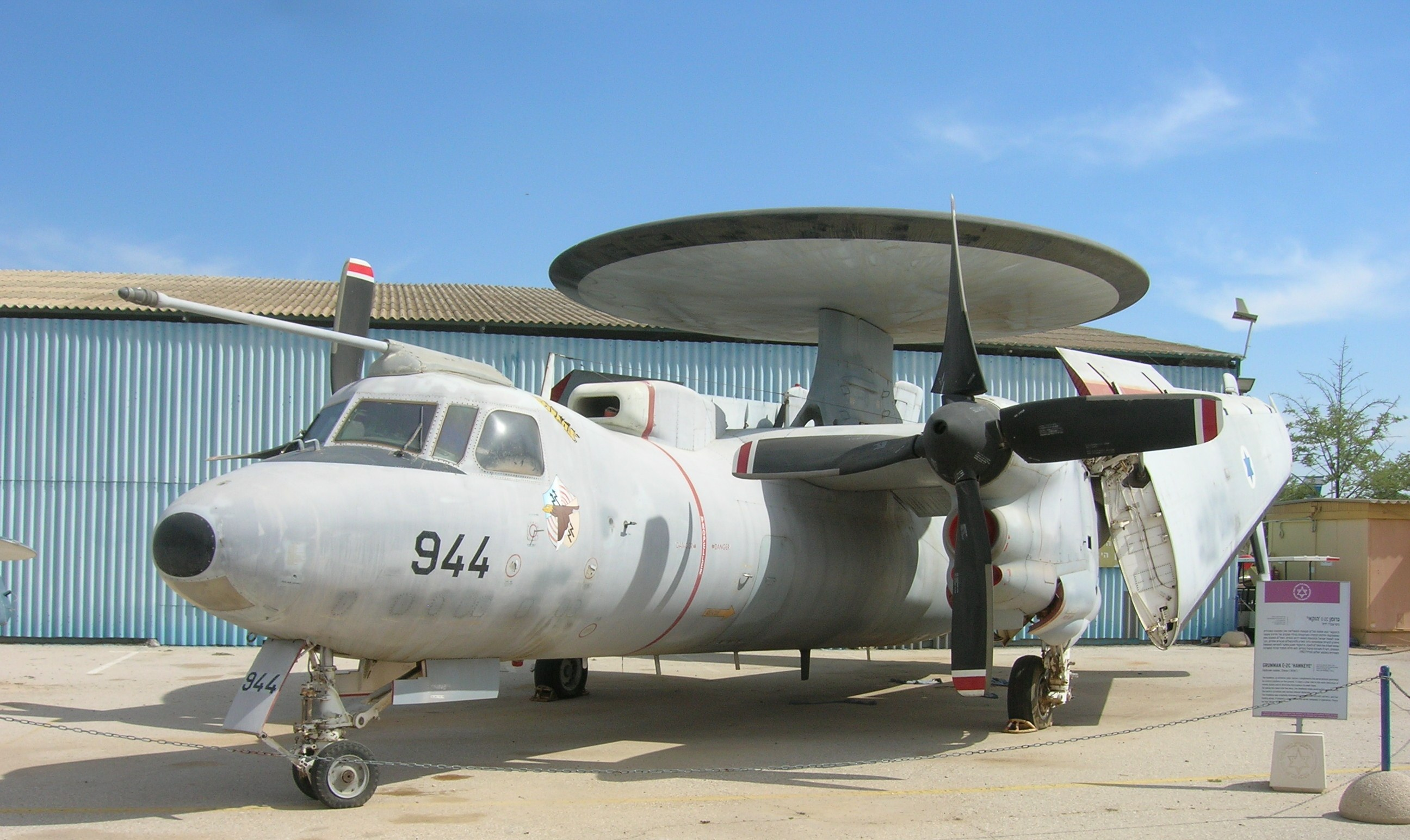 Grumman E-2C Hawkeye Daya kite